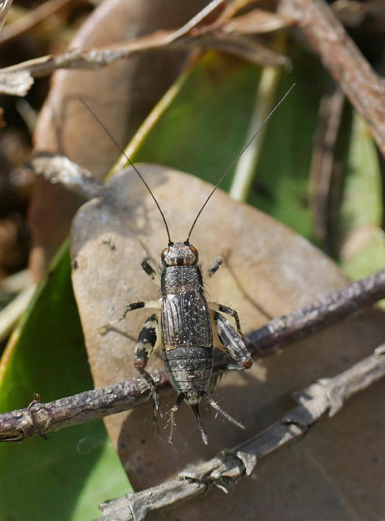 Dianemobius nigrofasciatus：マダラスズ 2018/10/03 和歌山県田辺市：Tanabe City. Wakayama Pref. Japan